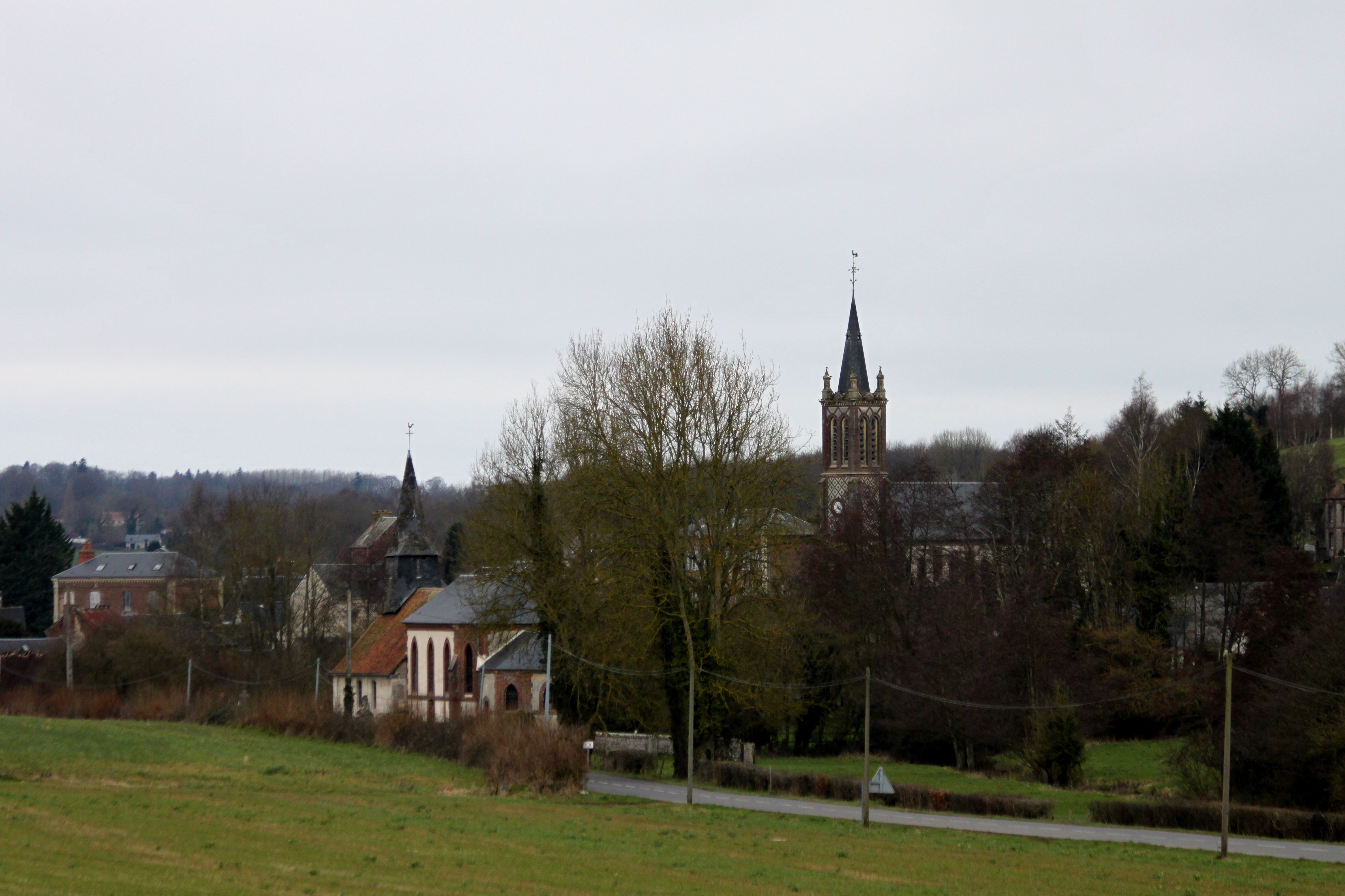 Eglises Saint-Martin et Saint-Paul